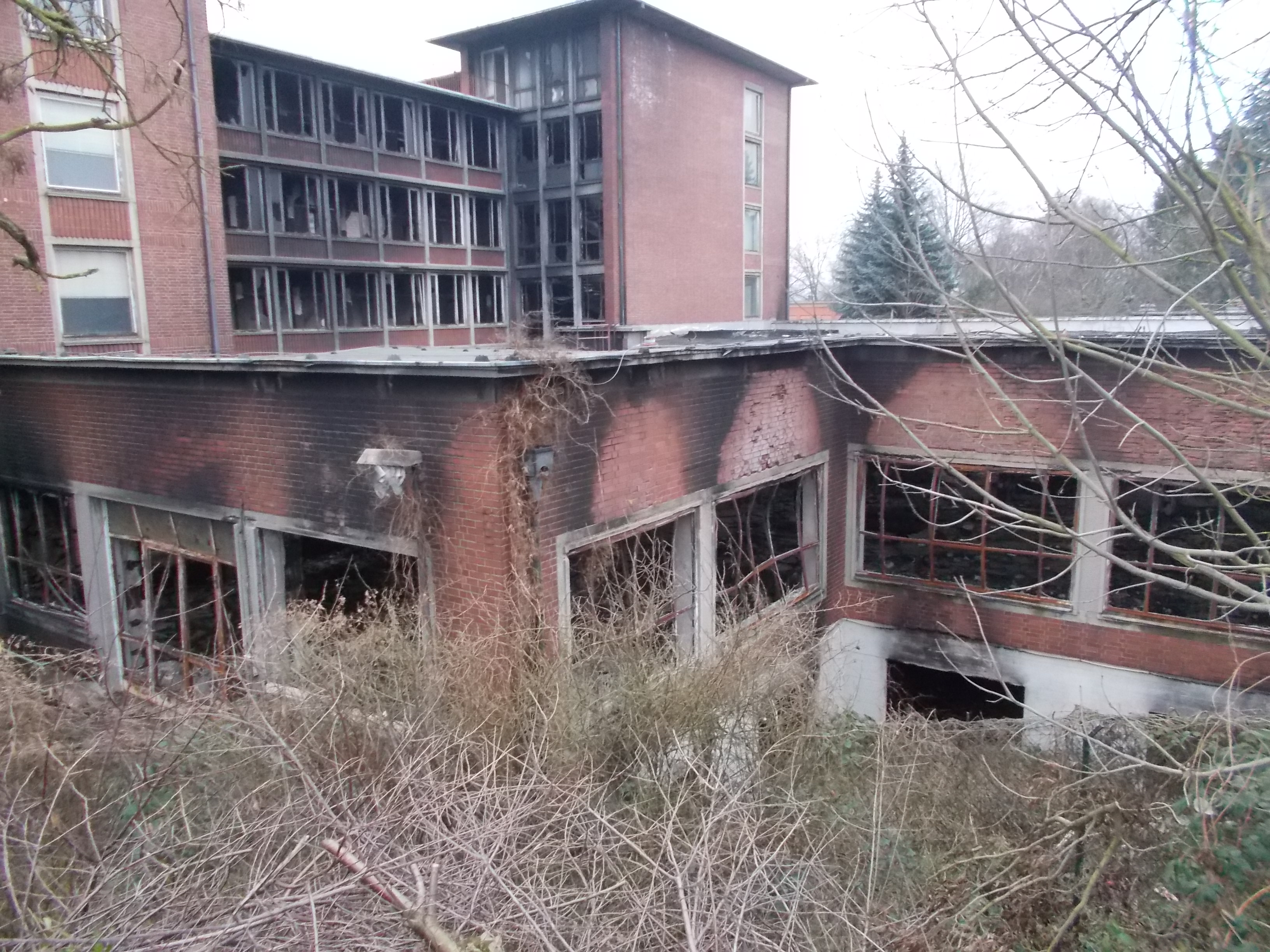 Pfaffwerk Neues Verwaltungsgebäude mit Ausstellungspavillion und Brandschäden